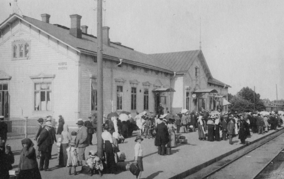 Kuopion vanha rautatieasema